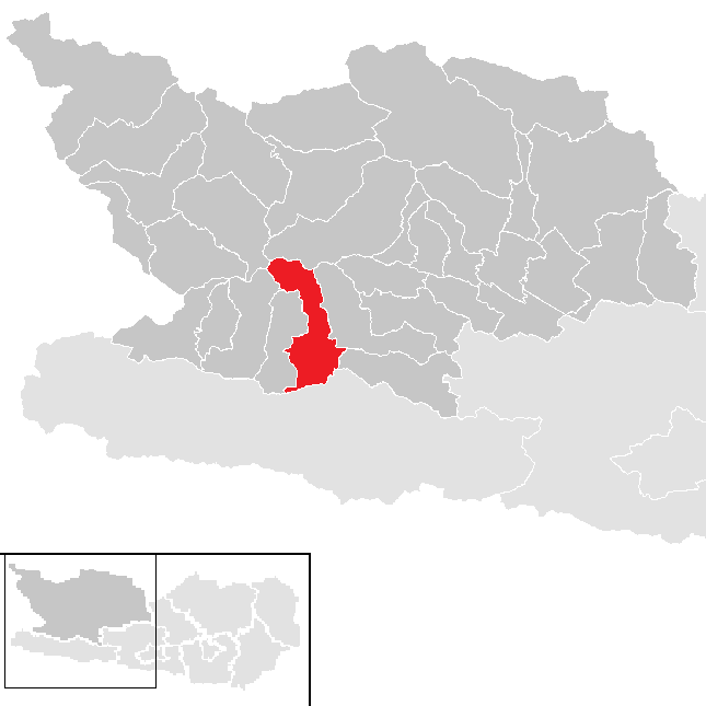 Bezirk Spittal an der Drau